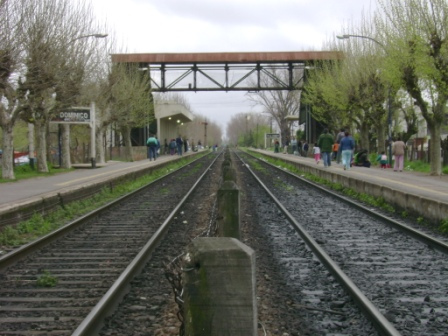 Estación Villa Dominico - hacia el norte